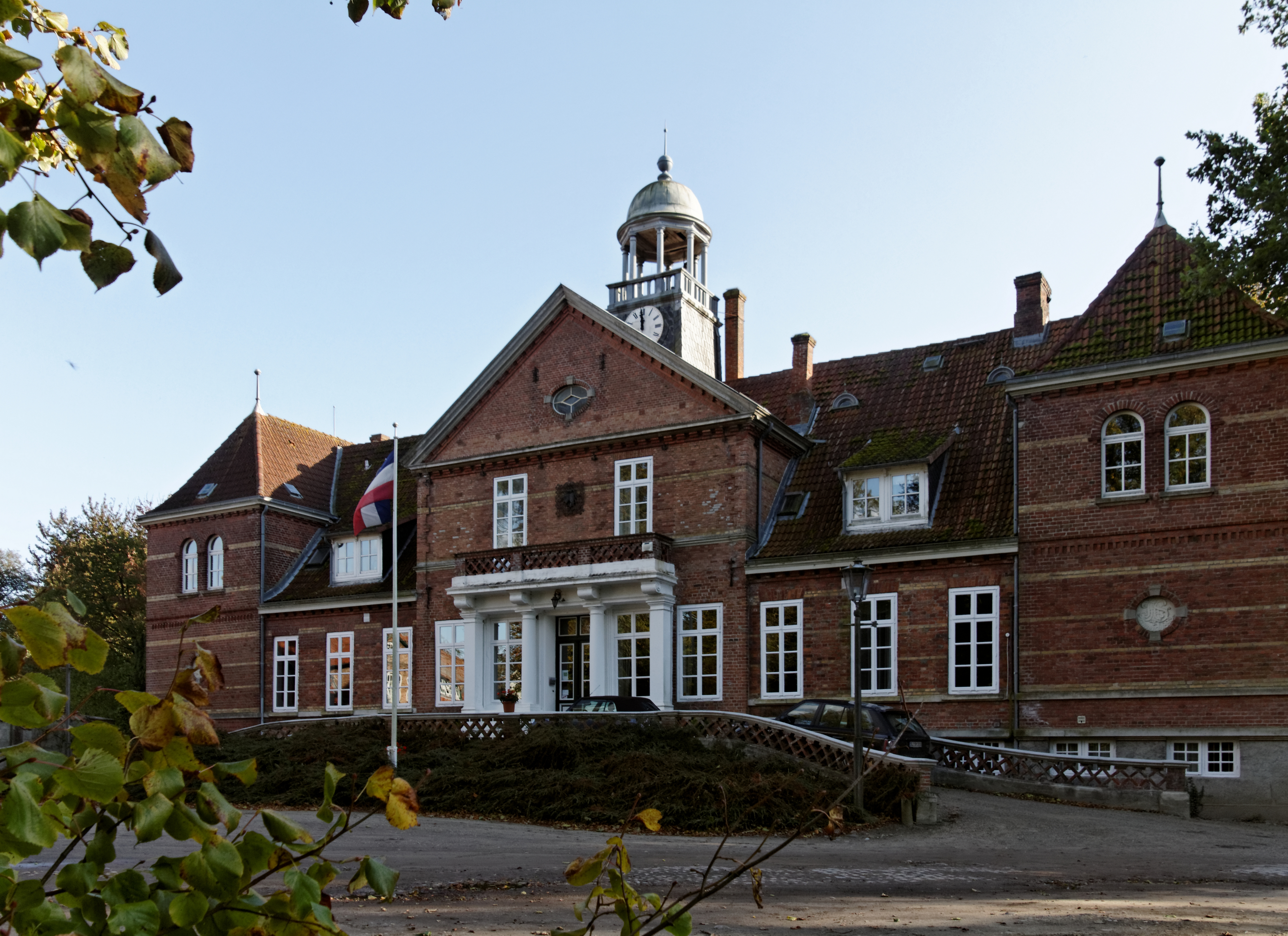 Maasholm, Gut Oehe; Herrenhaus